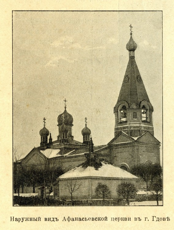 Гдов. Церковь Афанасия Александрийского. Утрачена